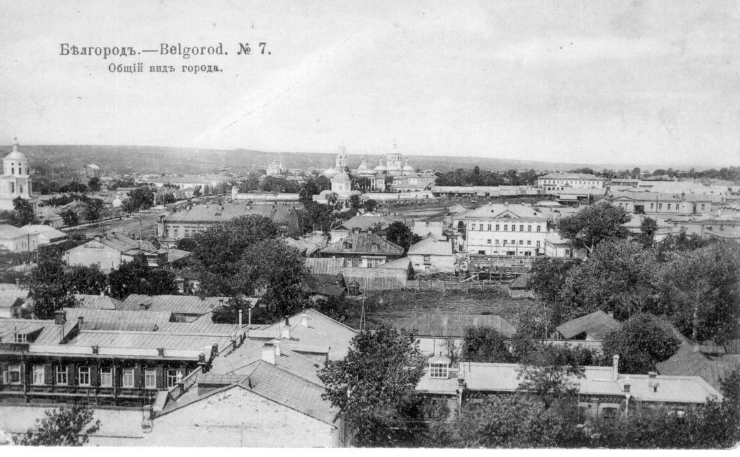 Общий вид старого города Белгорода